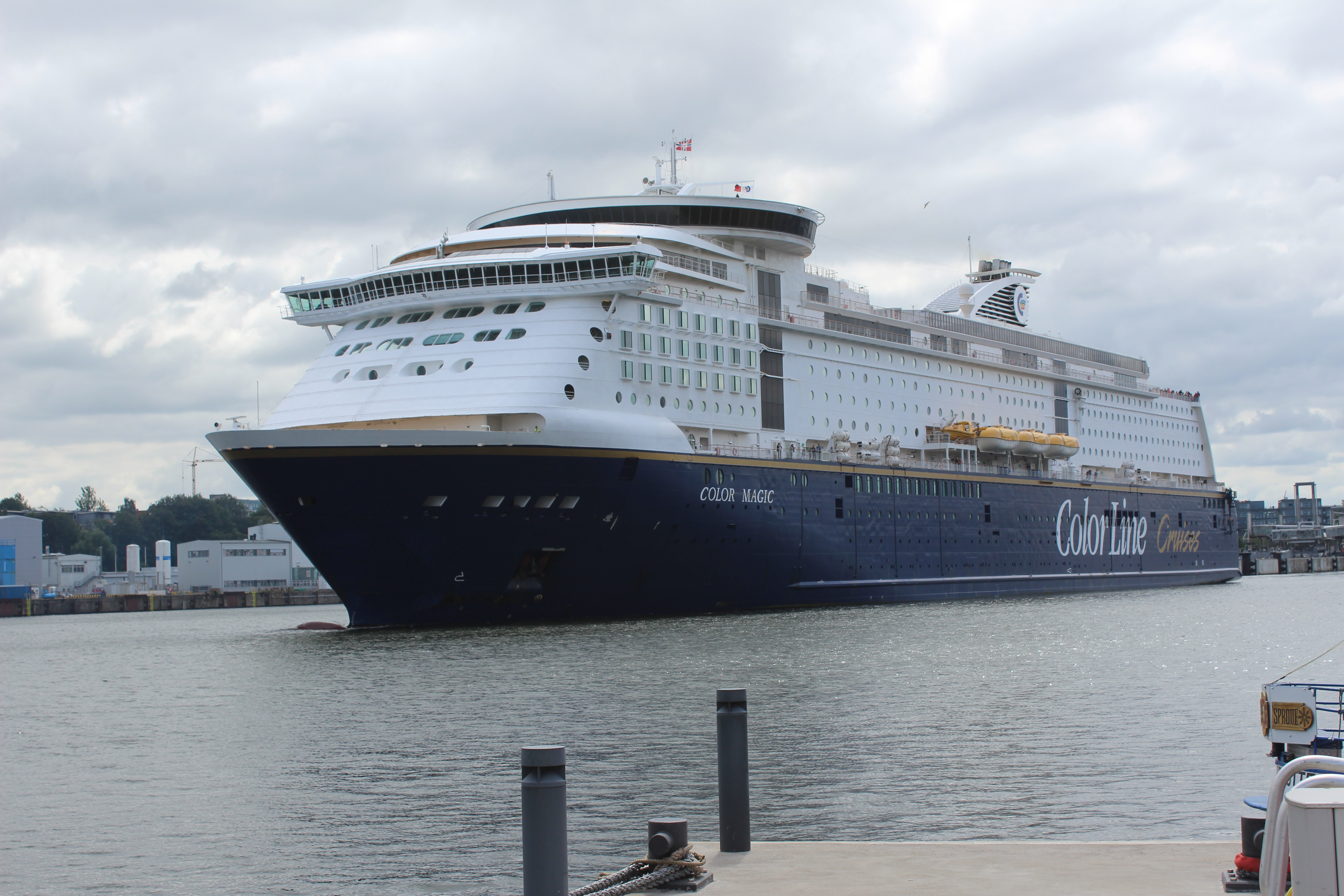 Fährschiff Color Magic im Juli 2019 in Kiel